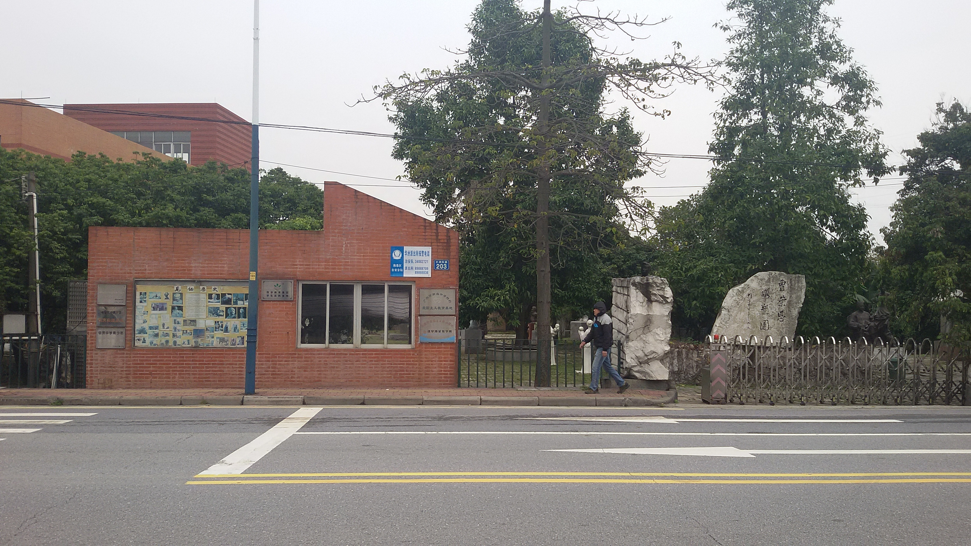 粵語: 曹崇恩雕塑園